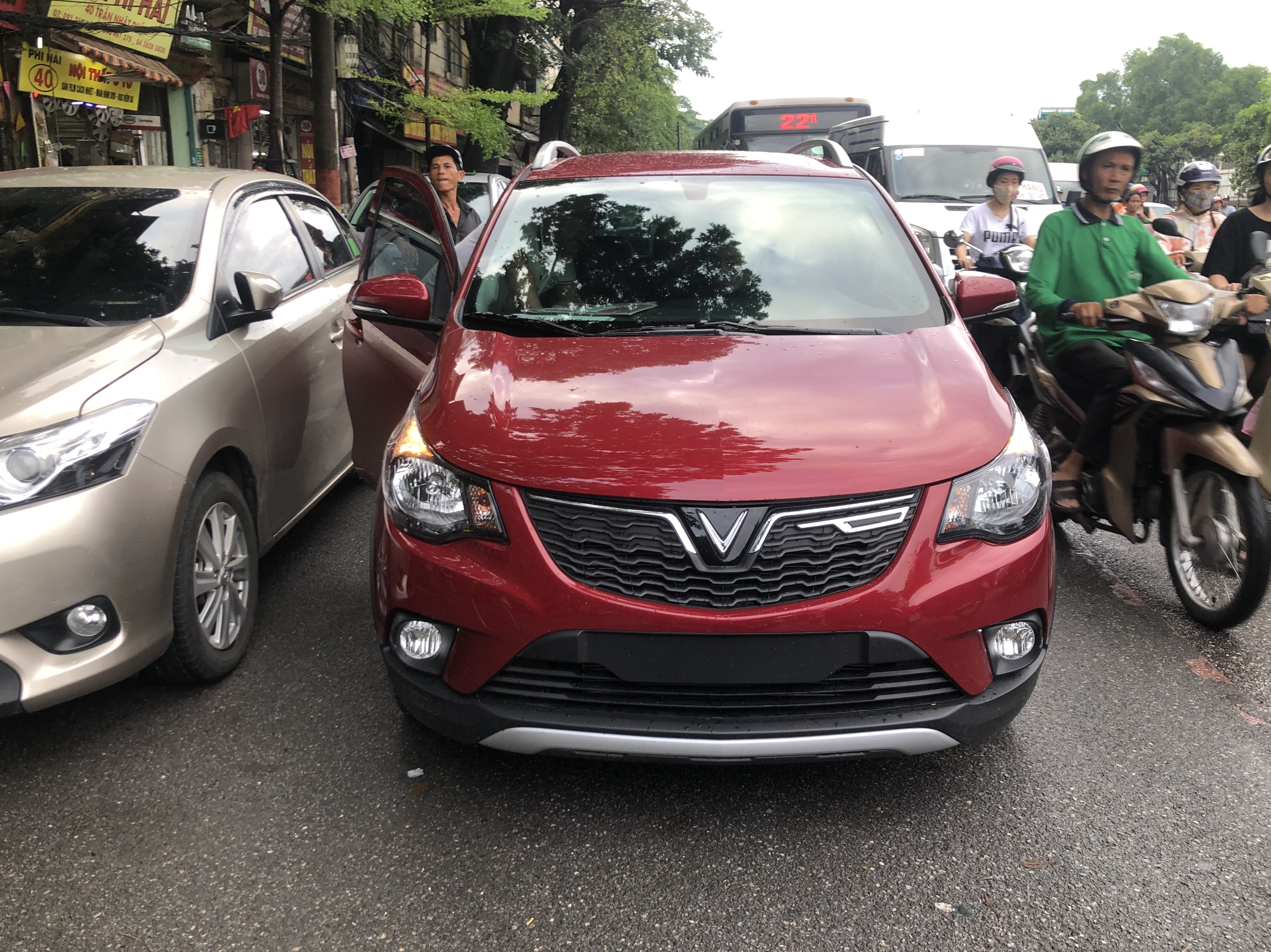 Mặt trước xe VinFast Fadil màu đỏ